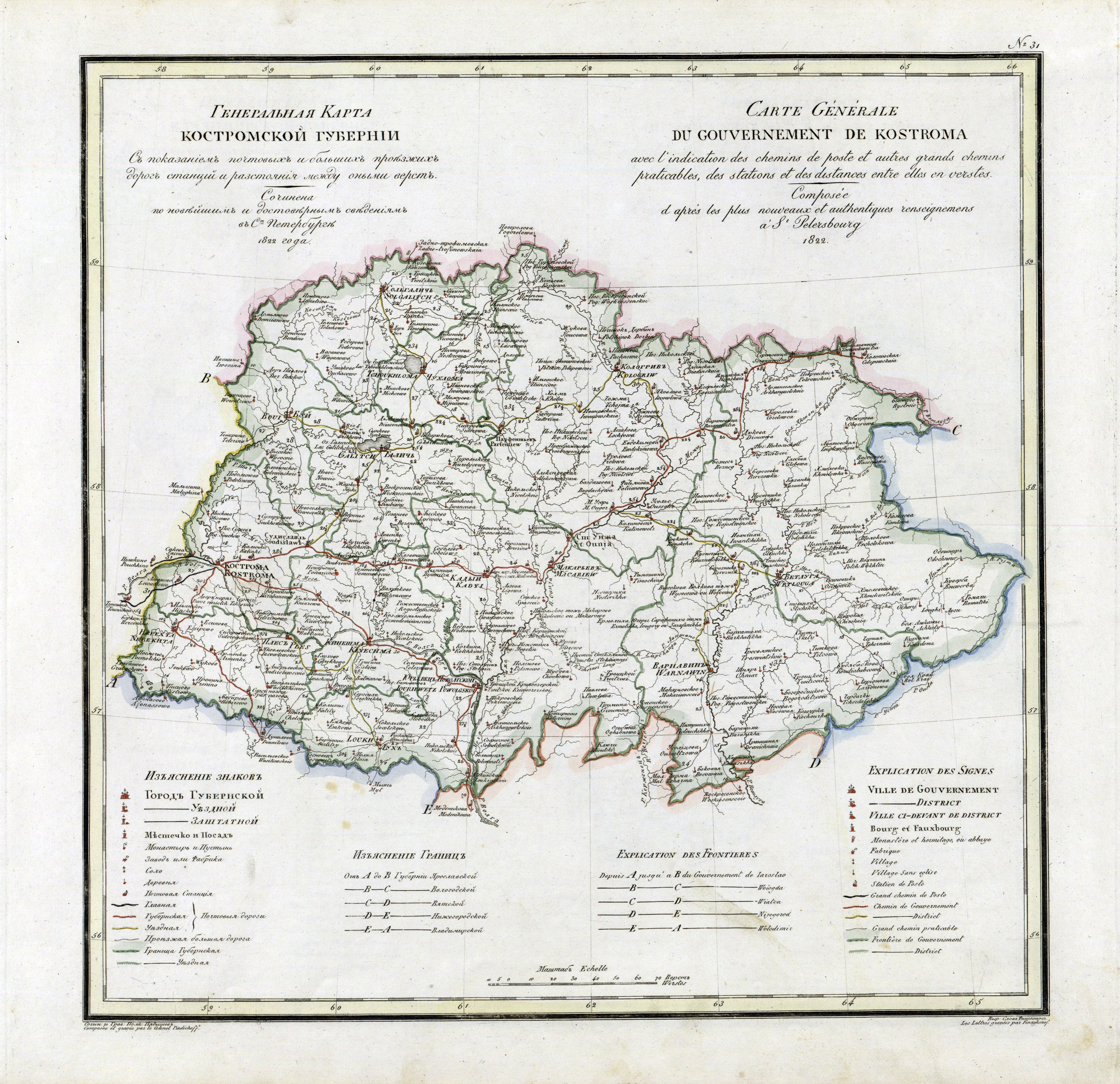 Атлас Российской империи, 1821 год. Костромская губерния